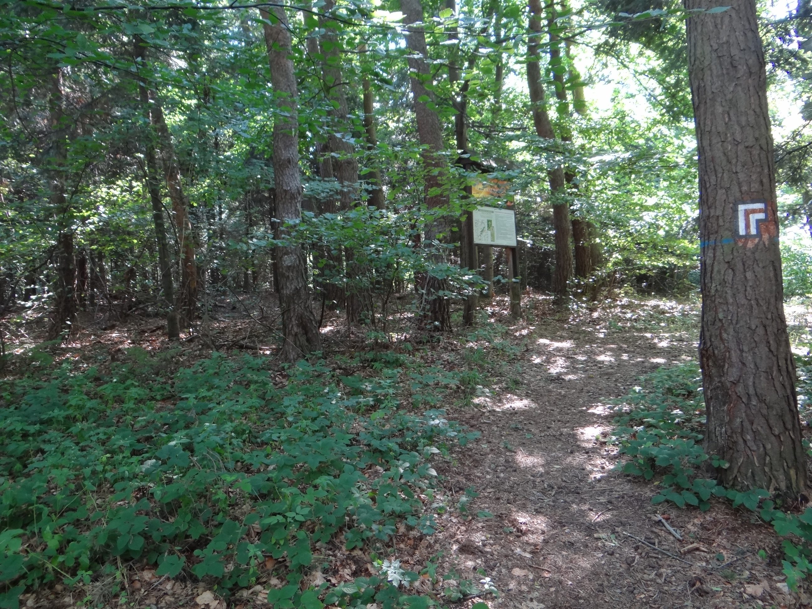 Rezerwat przyrody na Panieńskiej Gorze